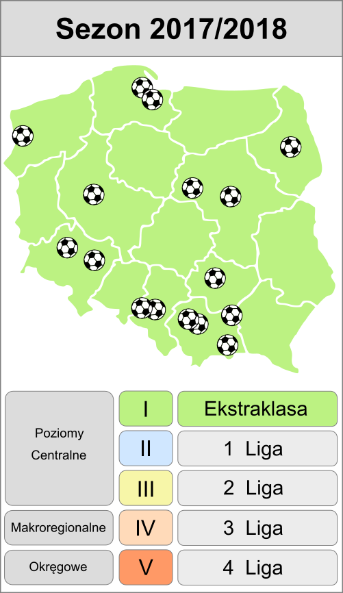 Zespoły występujące w ekstraklasie w sezonie 2017/2018